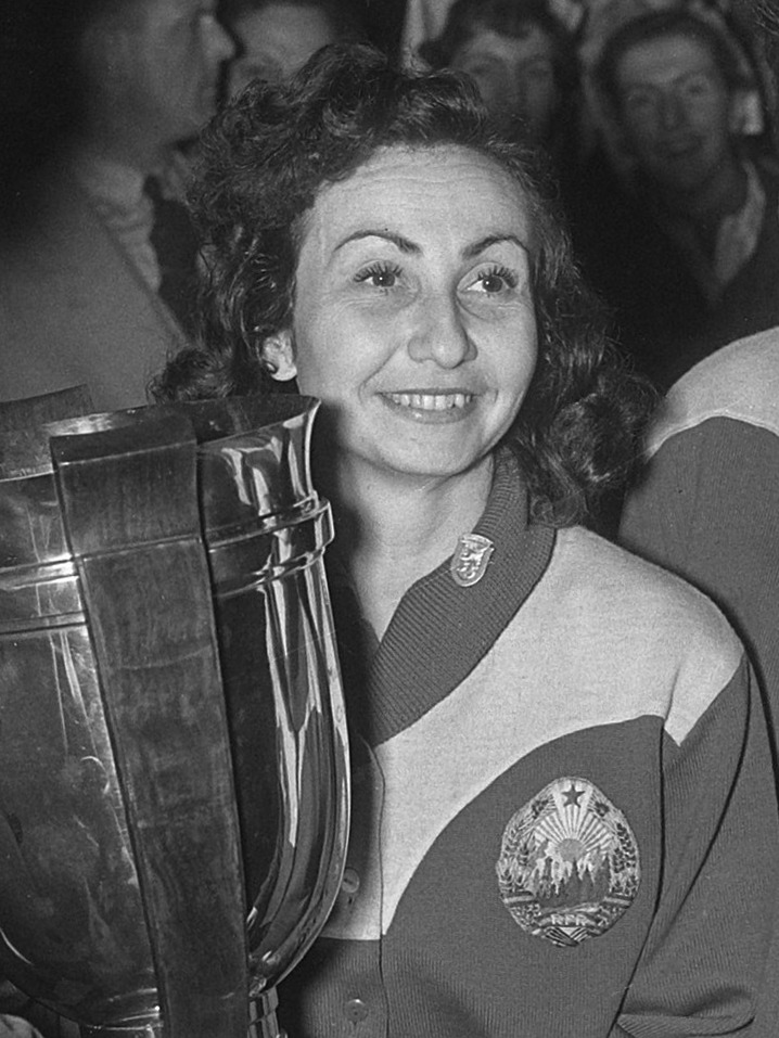 Tafeltennis Utrecht Roemeense dames de wereldtitel. Angelica Rozeanu